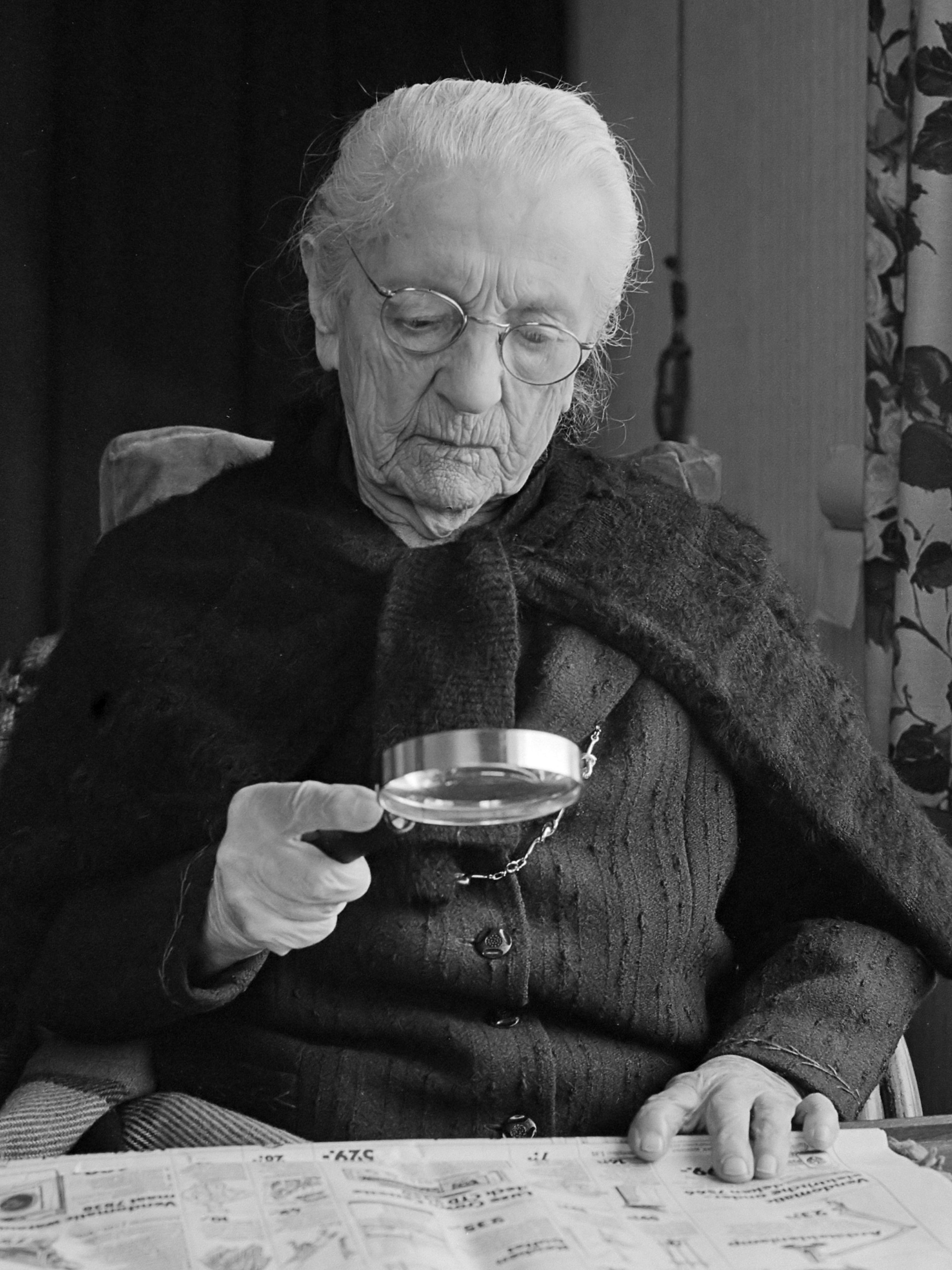 Wilhelmina Cammel, bijna 108 jaar; tijdens het lezen van de krant (met vergrootglas) 2 januari 1979